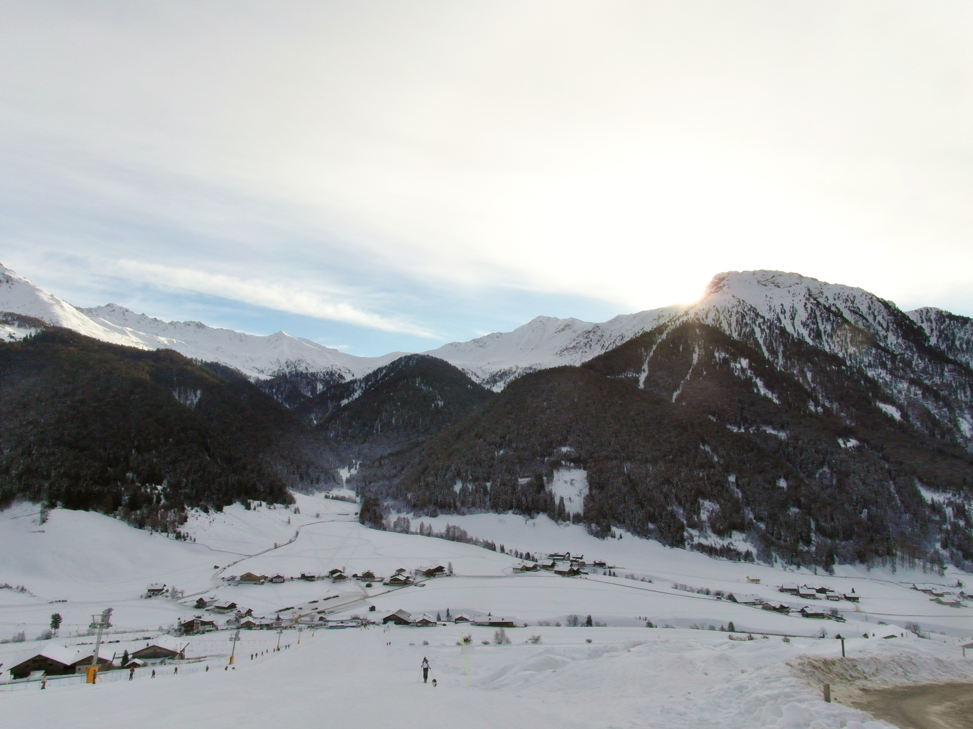 Panorama invernale Val di Casies